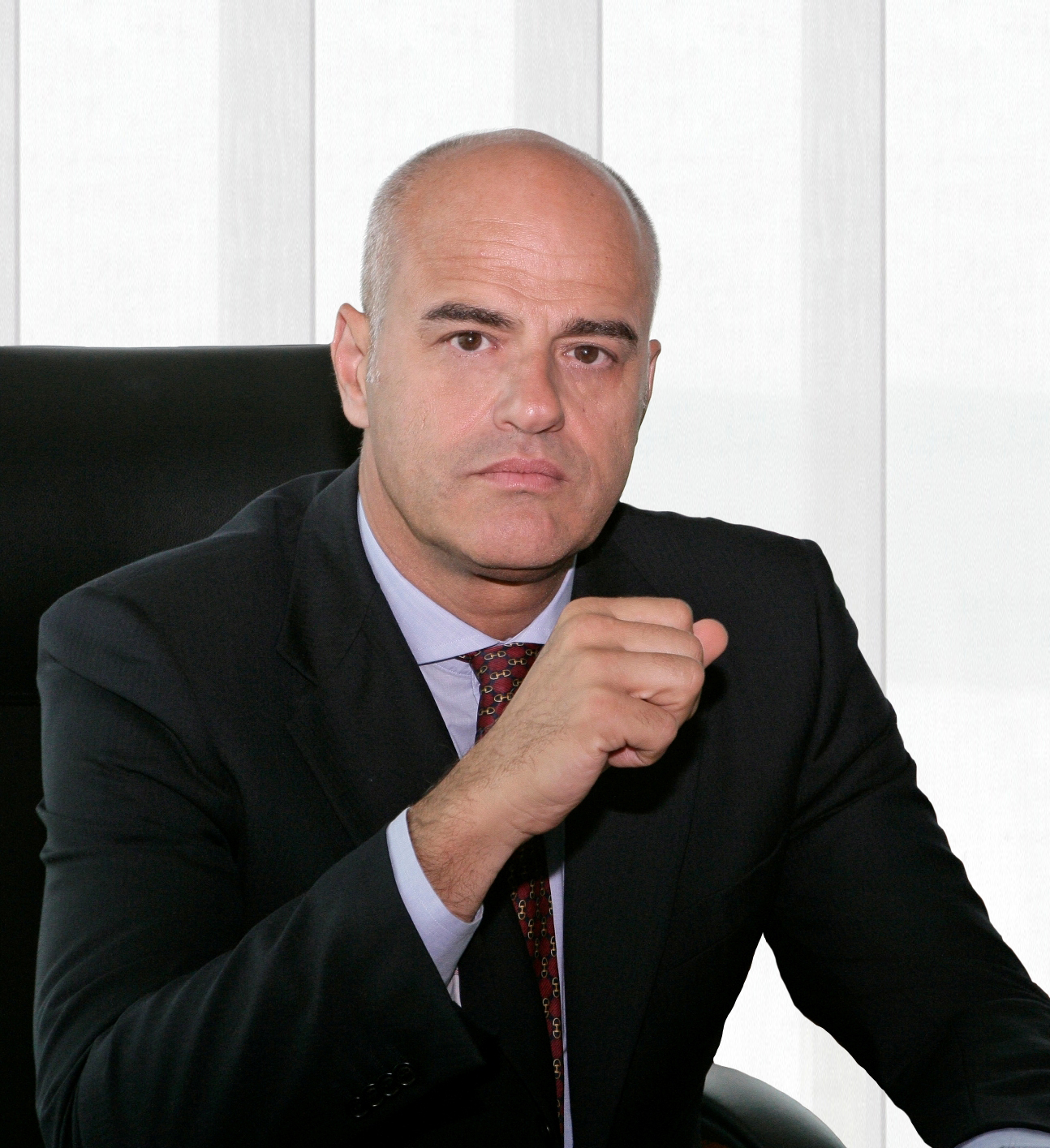 Foto amministratore delegato ENI Claudio Descalzi